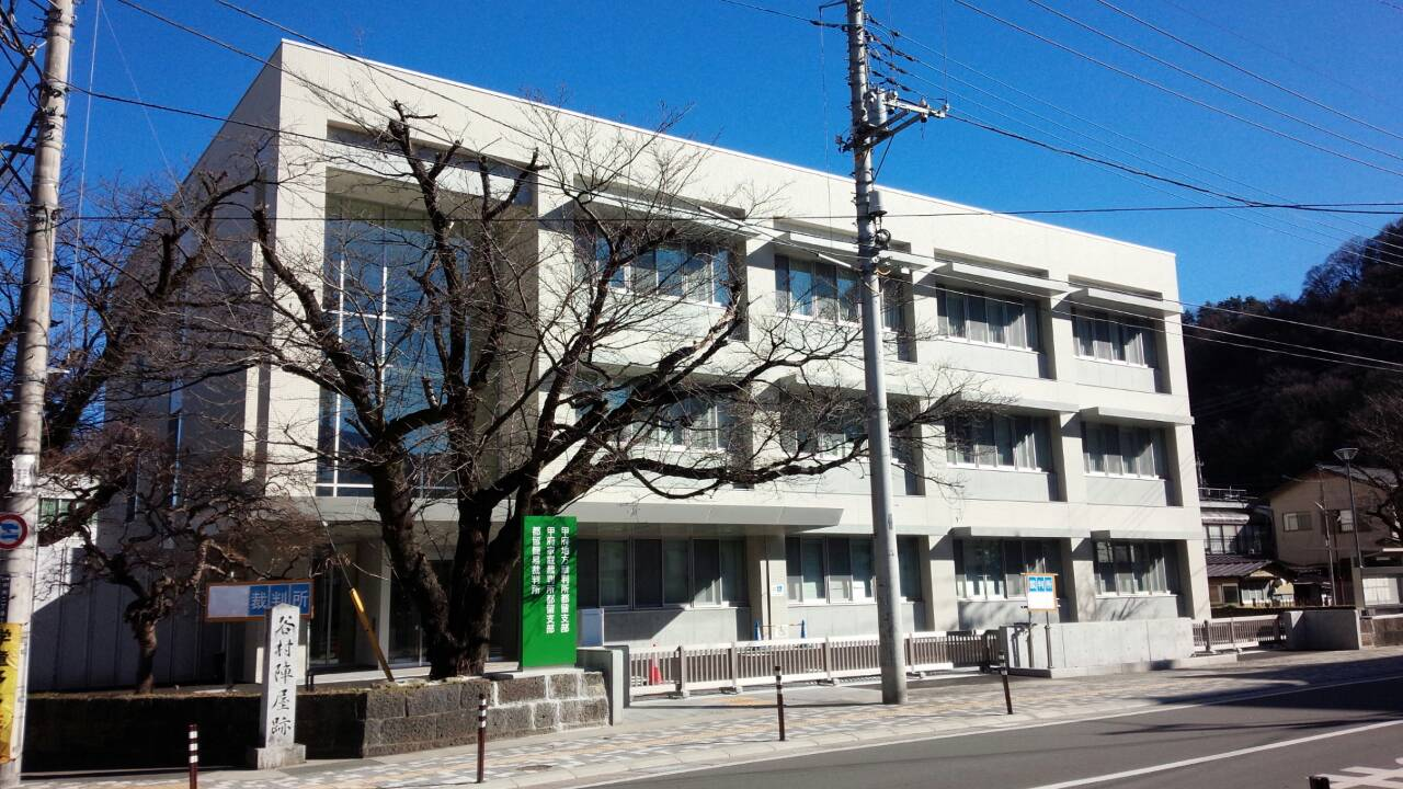 都留簡易裁判所新庁舎